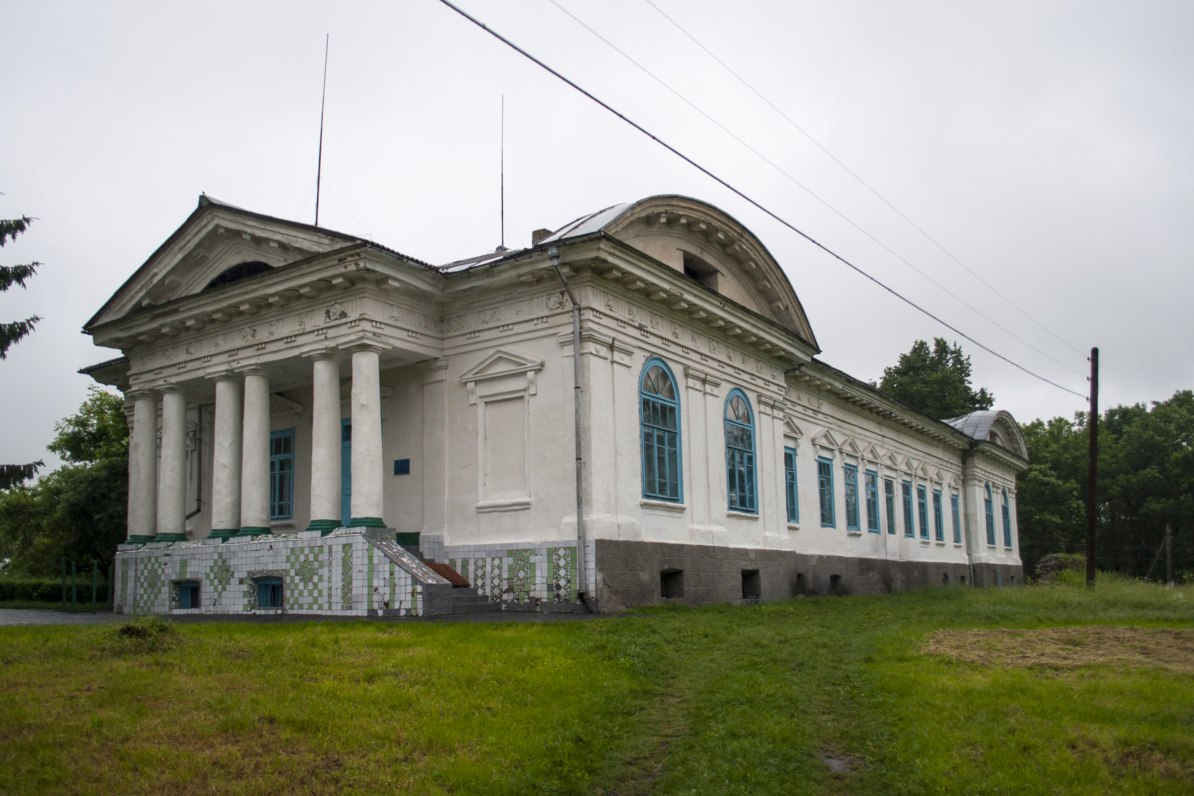 Палац маєтку побудований в кінці XVIII ст. в класицистичному стилі. побудований за проектом відомого архітекта Доменіка Мерліні